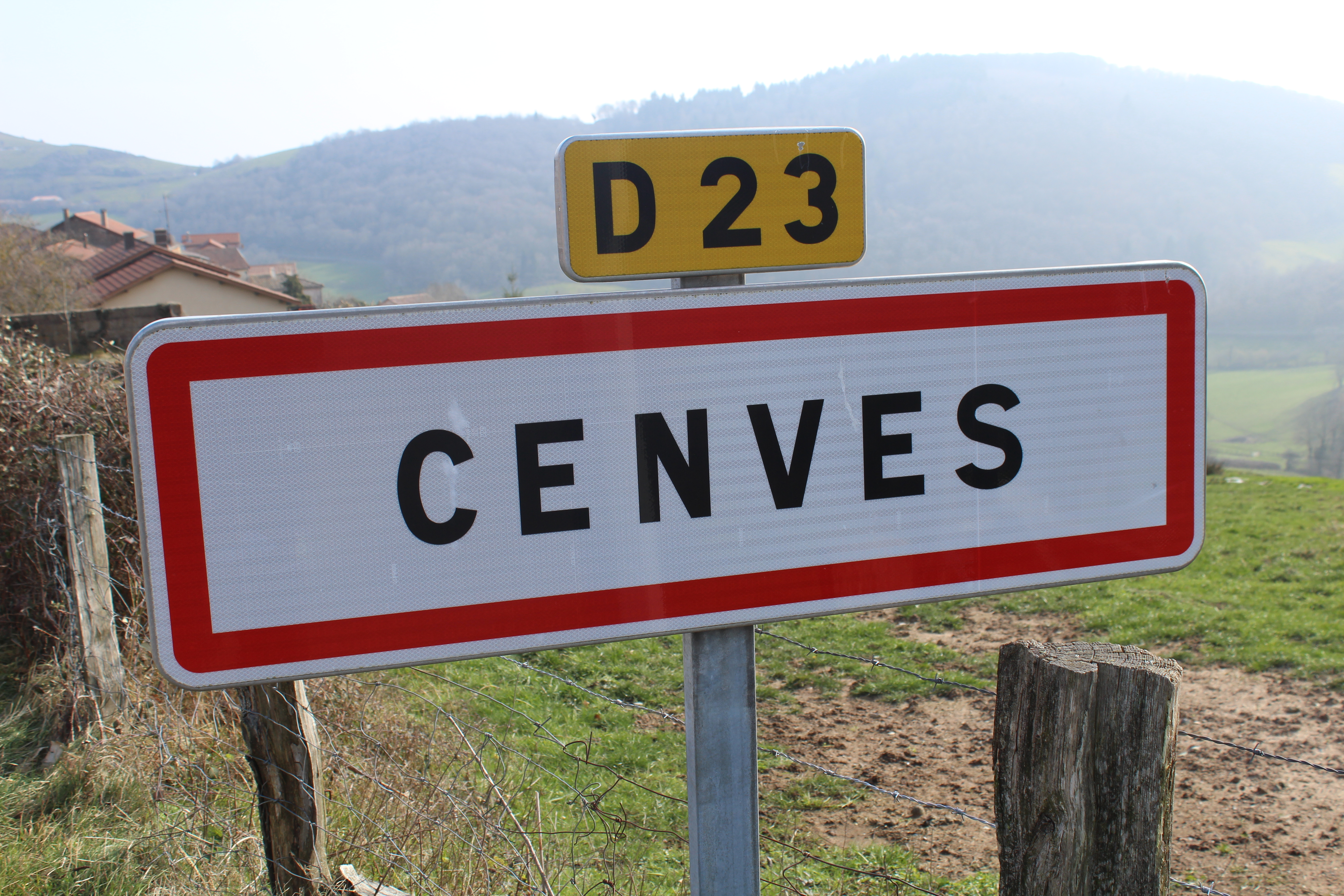 Panneau d'entrée dans Chénas.